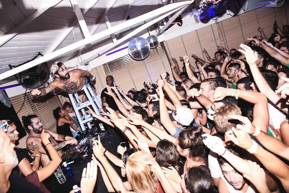 Castizo Club (2015)